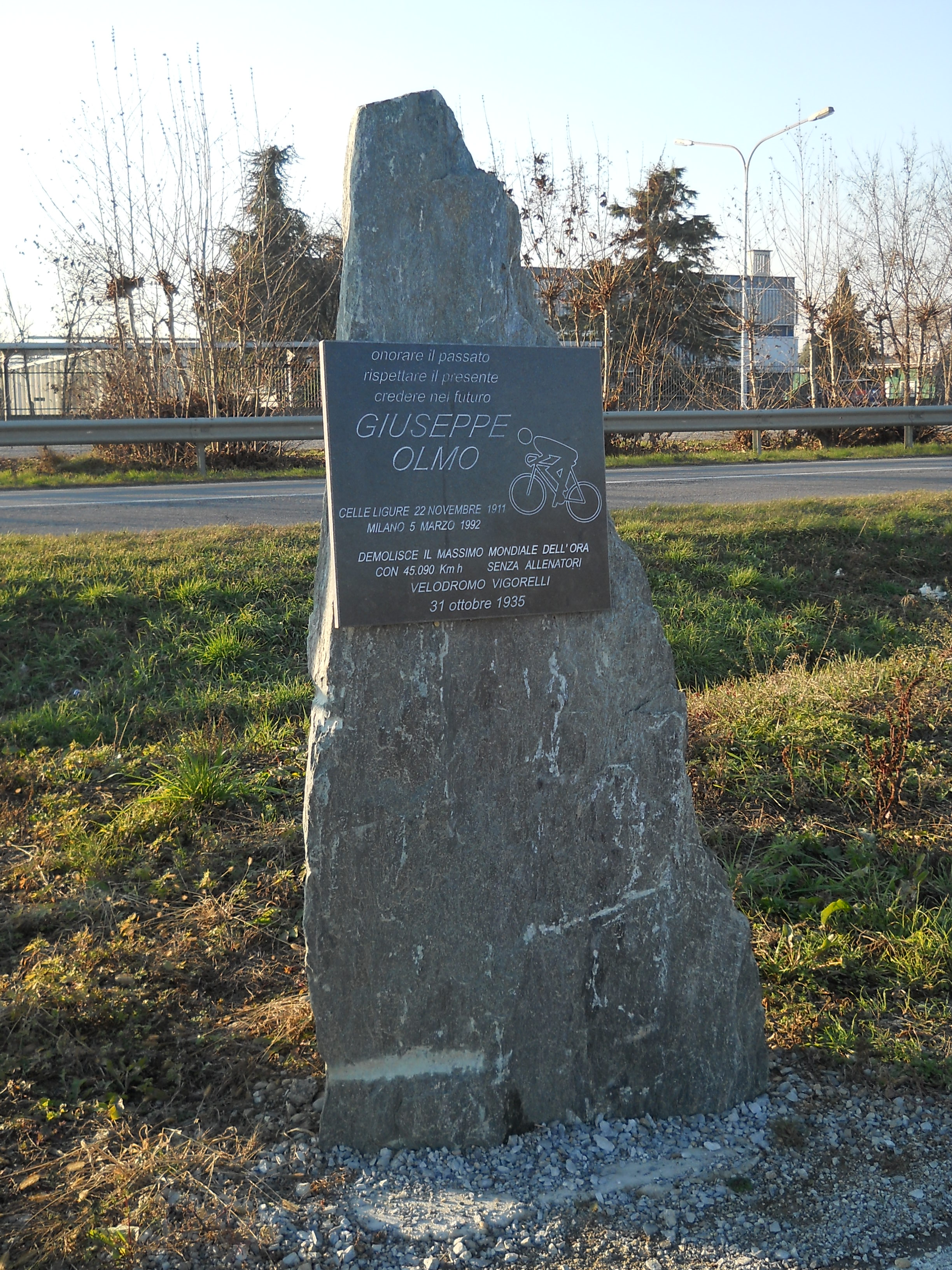 Stele in ricordo del ciclista Giuseppe Olmo, Comun Nuovo, Bergamo, Italia